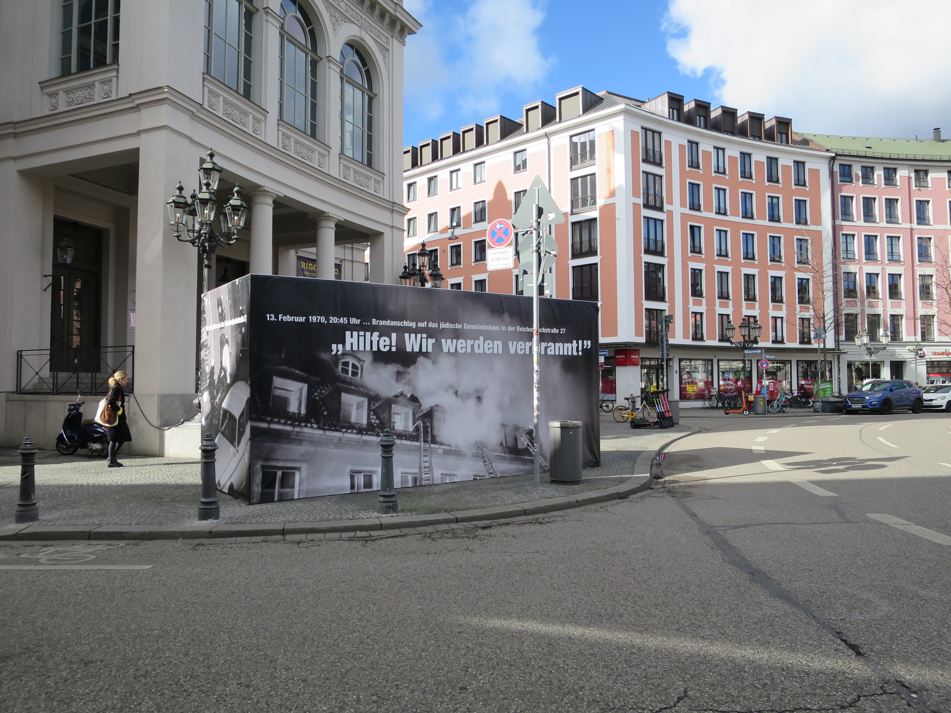 Gedächtnis-Container am Gärtnerplatz zum Gedenken an den 50. Jahrestag des Brandanschlags auf das jüdische Gemeindehaus.